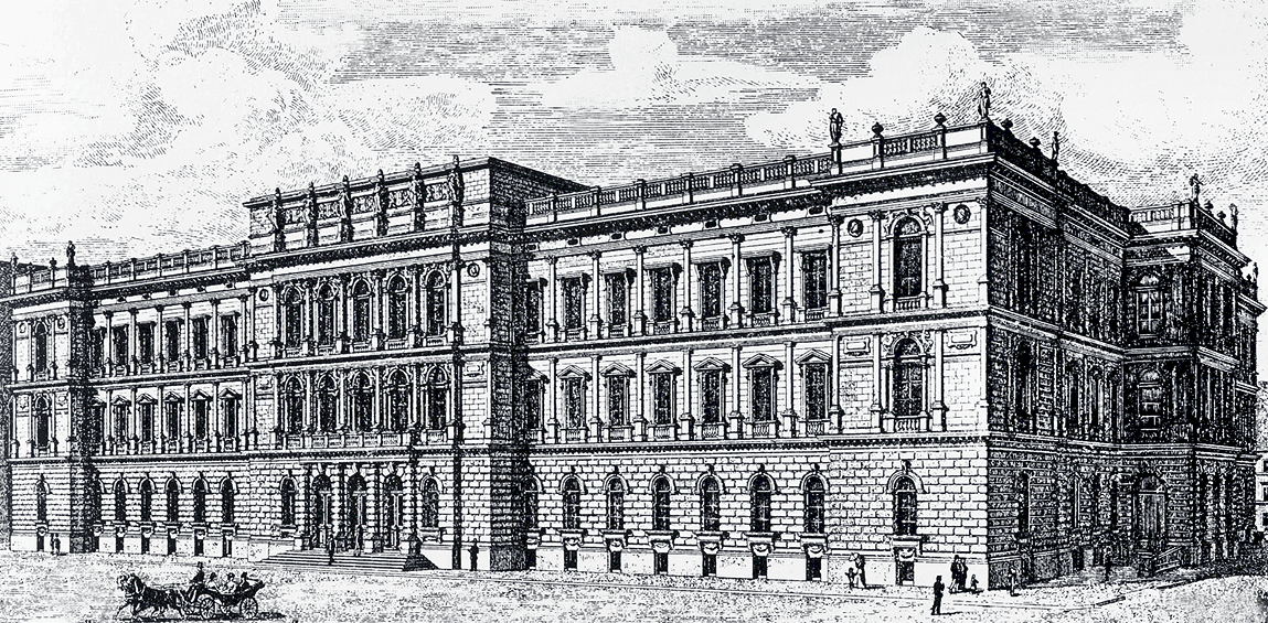 Ehemaliger Justizpalast in Brünn um die Mitte des 19. Jahrhunderts